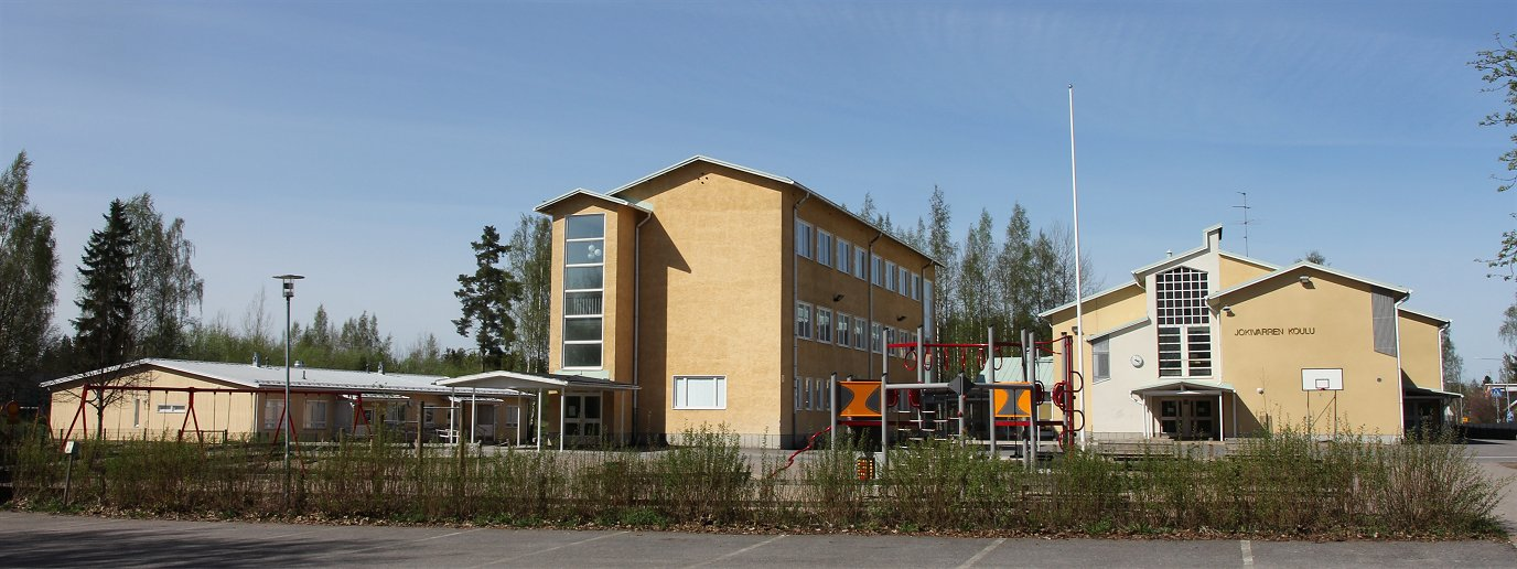 Jokivarren koulu on Koillis-Vantaan Korson suuralueen Jokivarren ja Nikinmäen kaupunginosissa kahdessa opetuspisteessä toimiva suomenkielinen alakoulu.